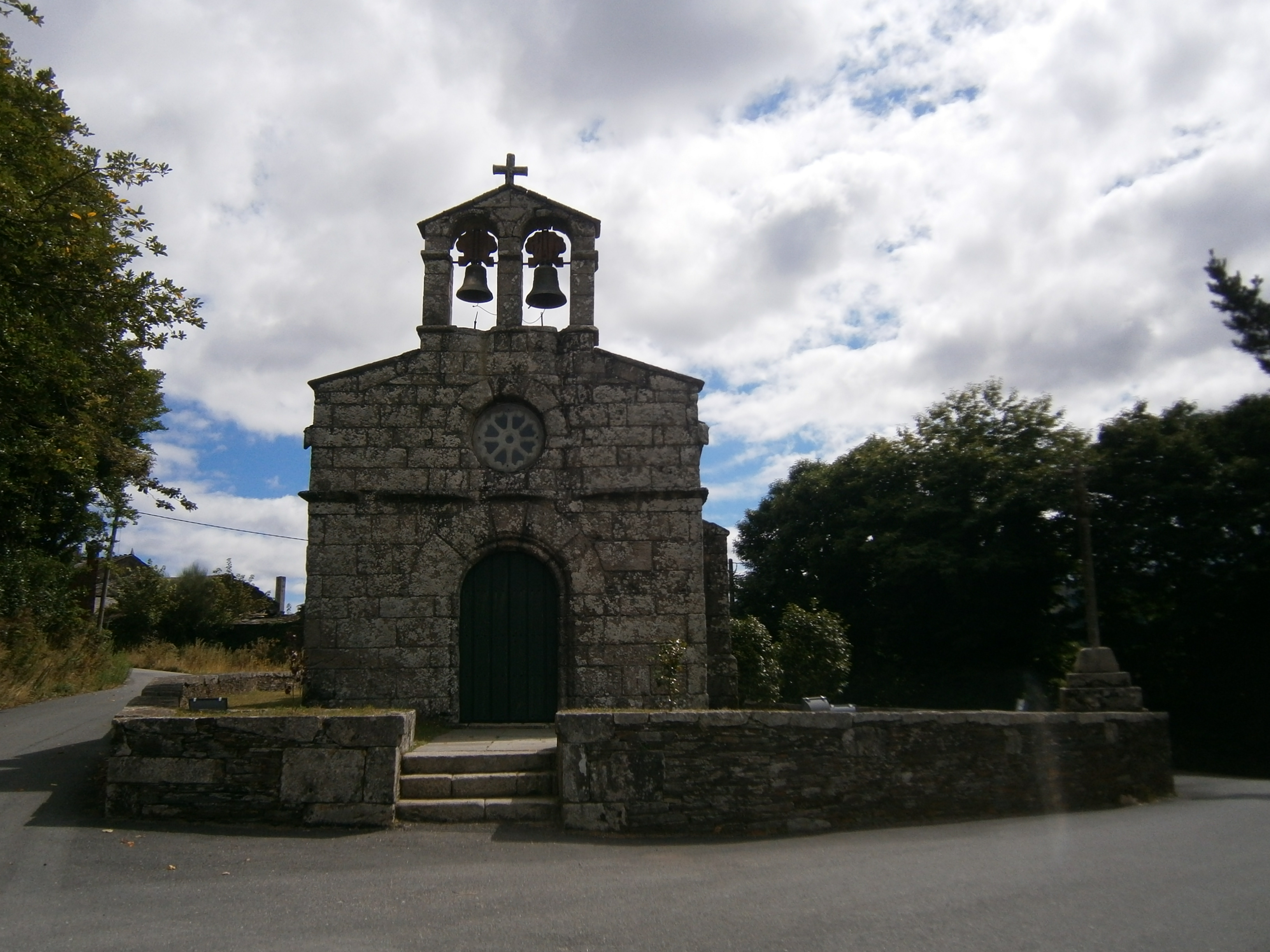 Igrexa de Santa María de Abadín